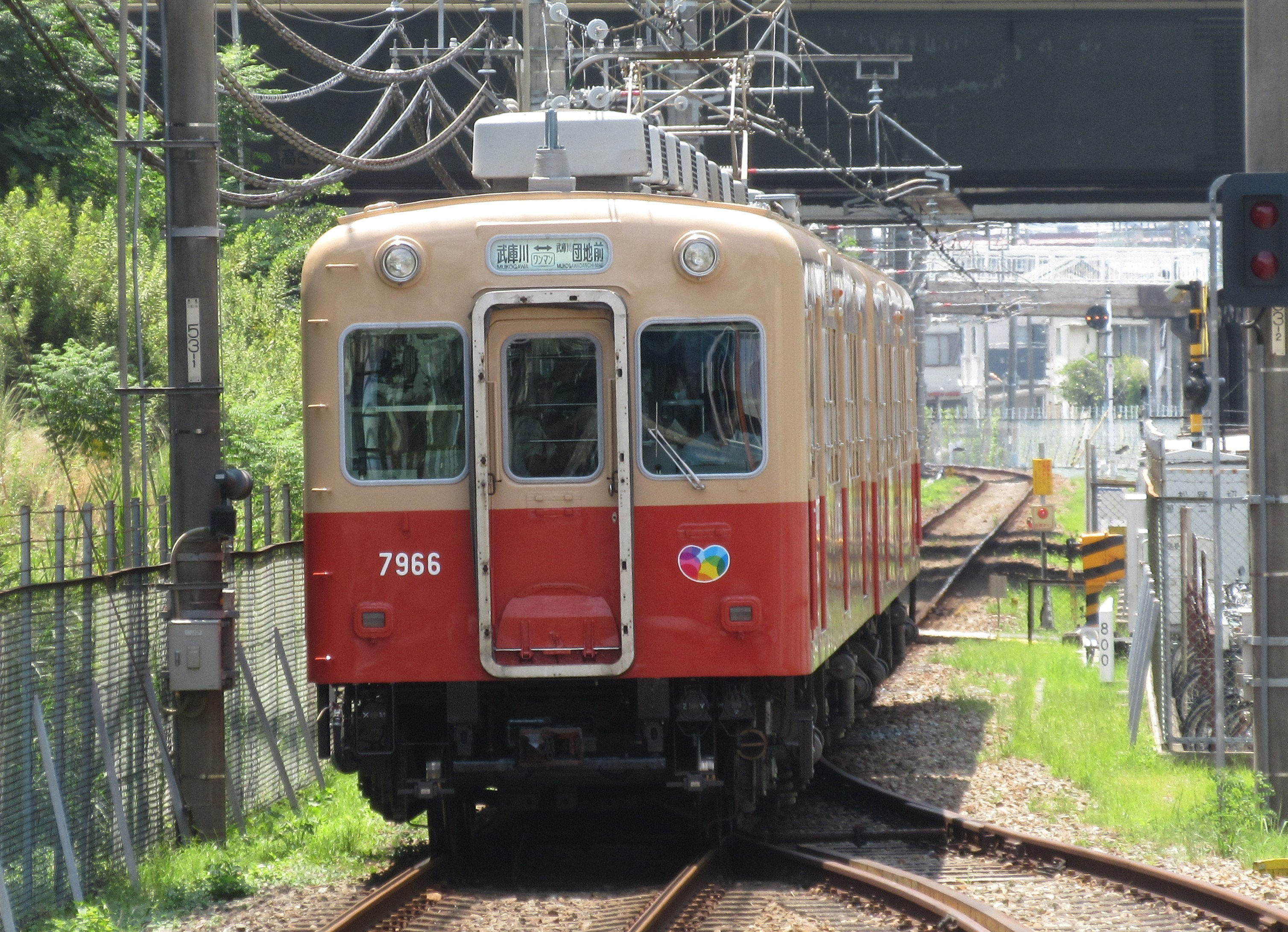 阪神電鉄7966編成(武庫川駅にて)